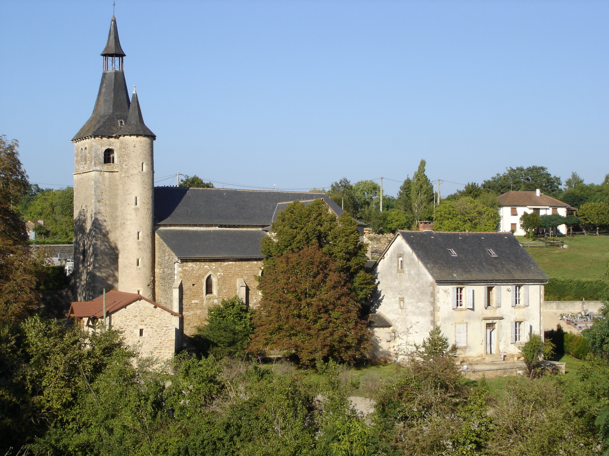 L'église et le village de Savignac (Aveyron) -- Photo amateur prise par moi-même